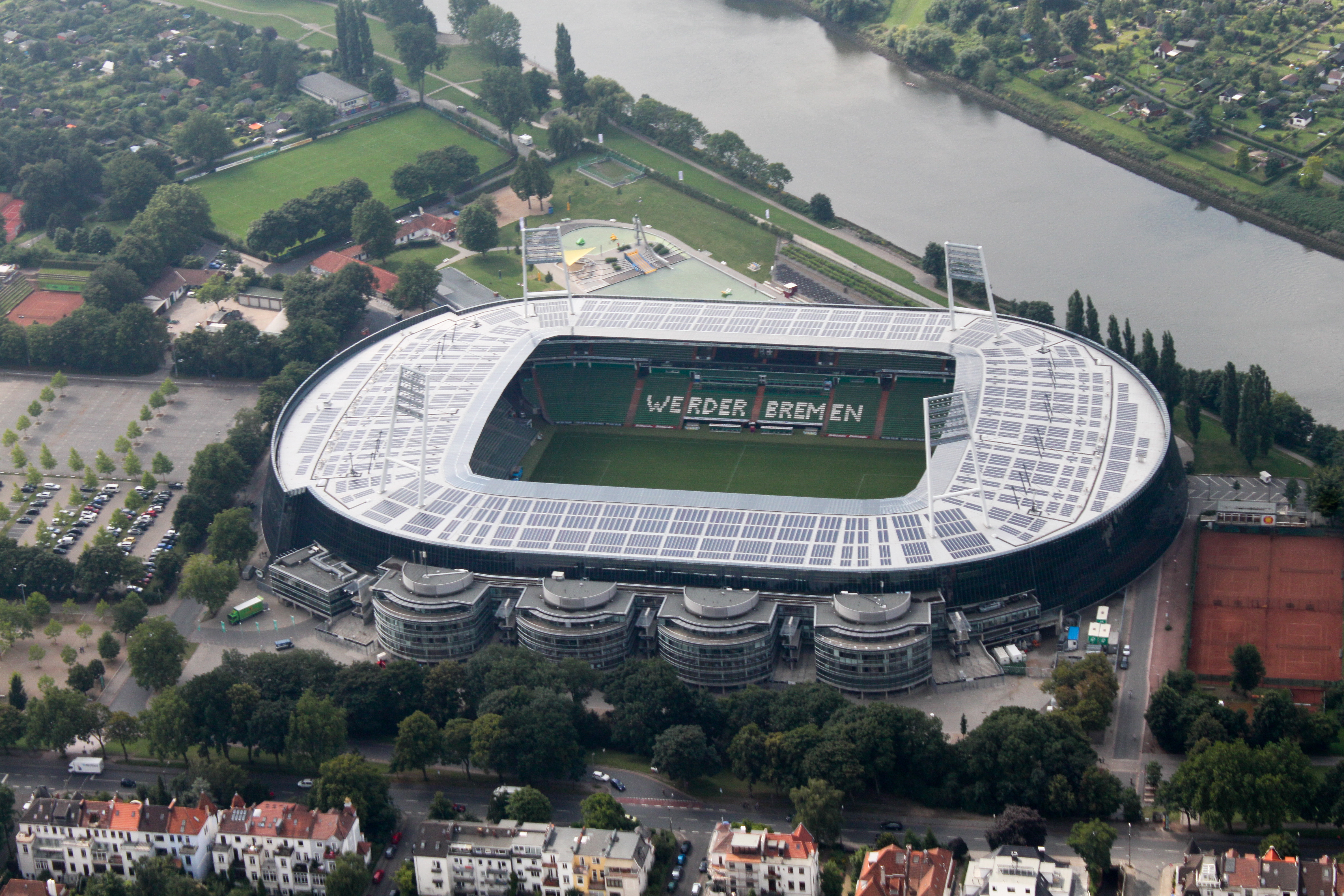 Fotoflug: Airport Bremen - Kattenturm - Krankenhaus LdW - Ochtumpark - Brinkum Nord - Huckelriede - Weserstadion - Peterswerder (identische Bildbeschreibung für File:2012-08-08-fotoflug-bremen zweiter flug 0301.JPG bis File:2012-08-08-fotoflug-bremen zweiter flug 0406.JPG; alle mit GPS-Koordinaten